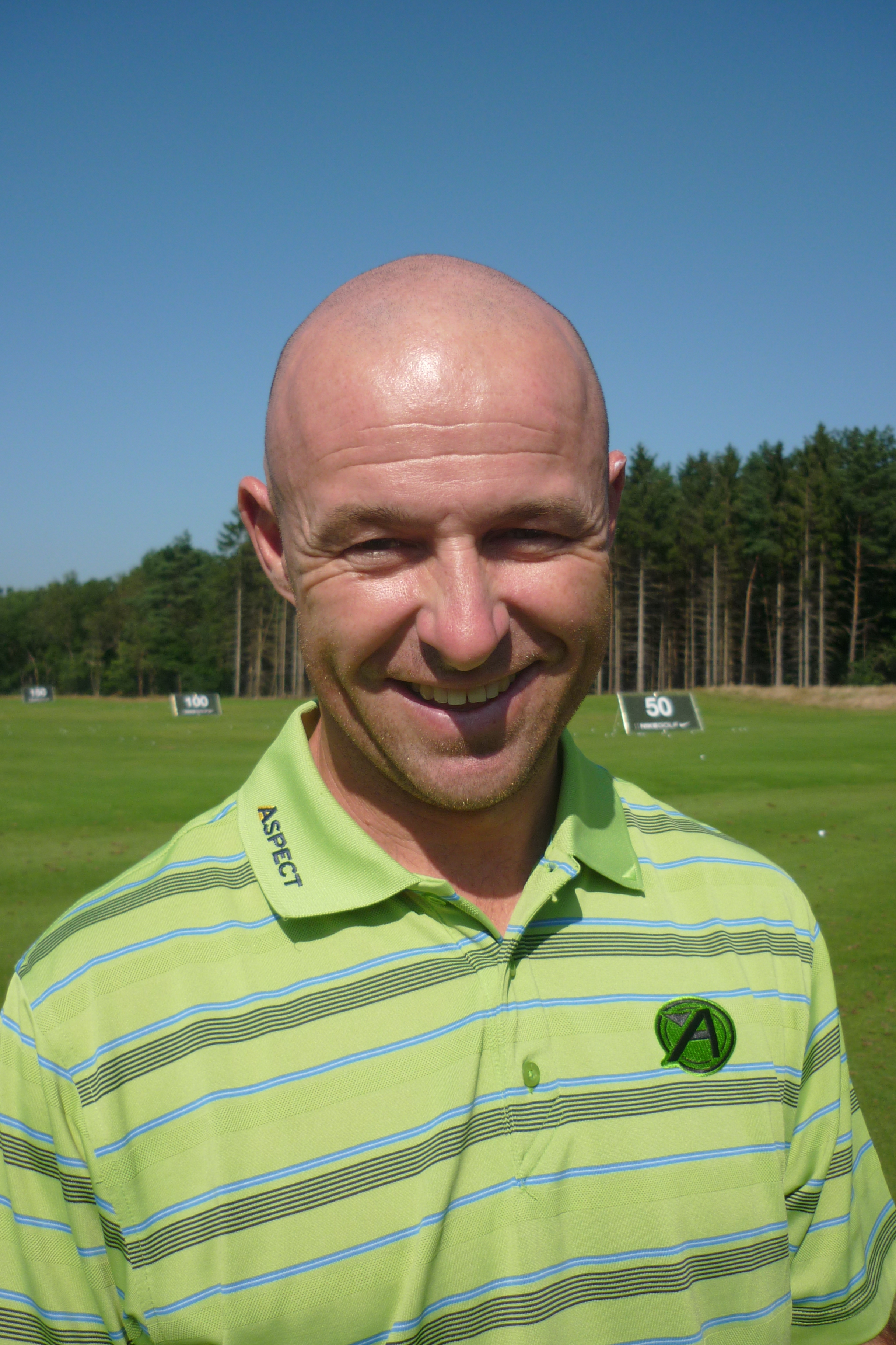 Robert Coles